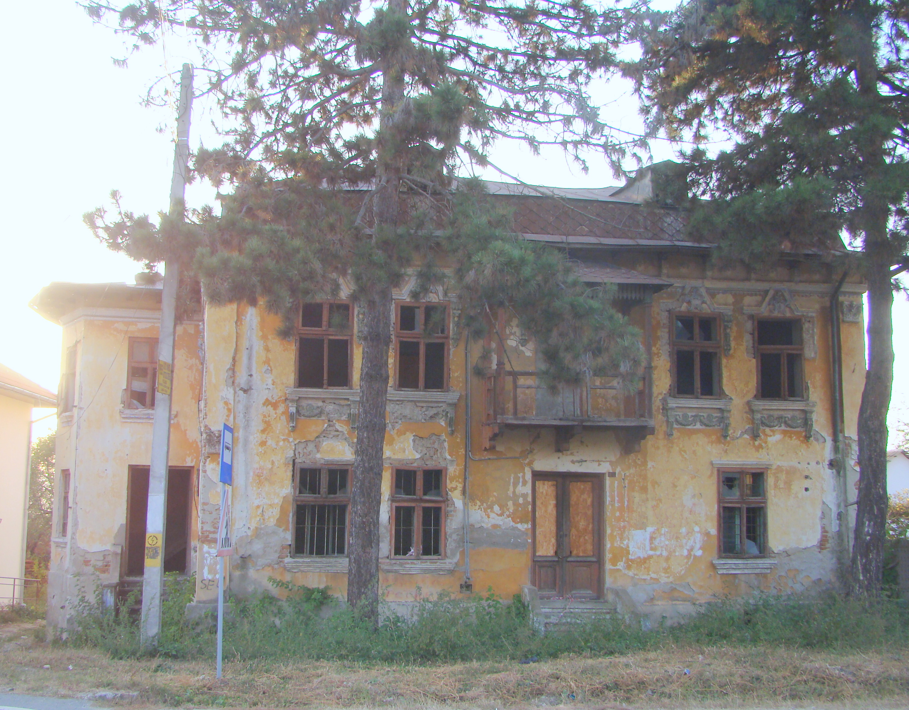 Casă, sat Plopșoru; comuna Plopșoru 60 înc. sec. XIX